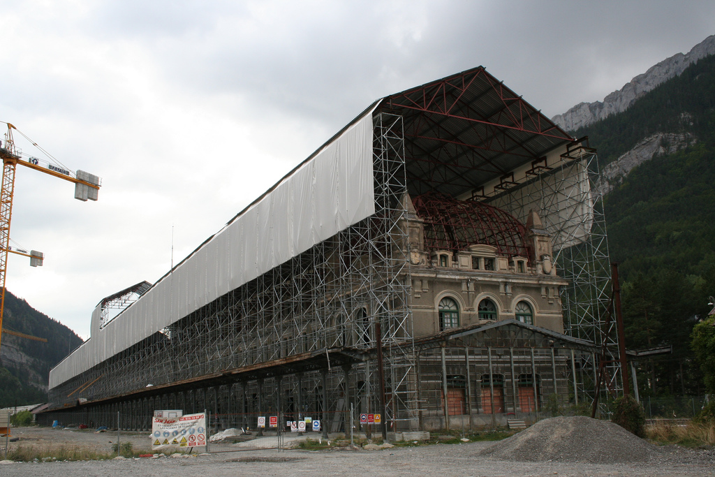 Desde la parte Francesa, la estación con andamios.